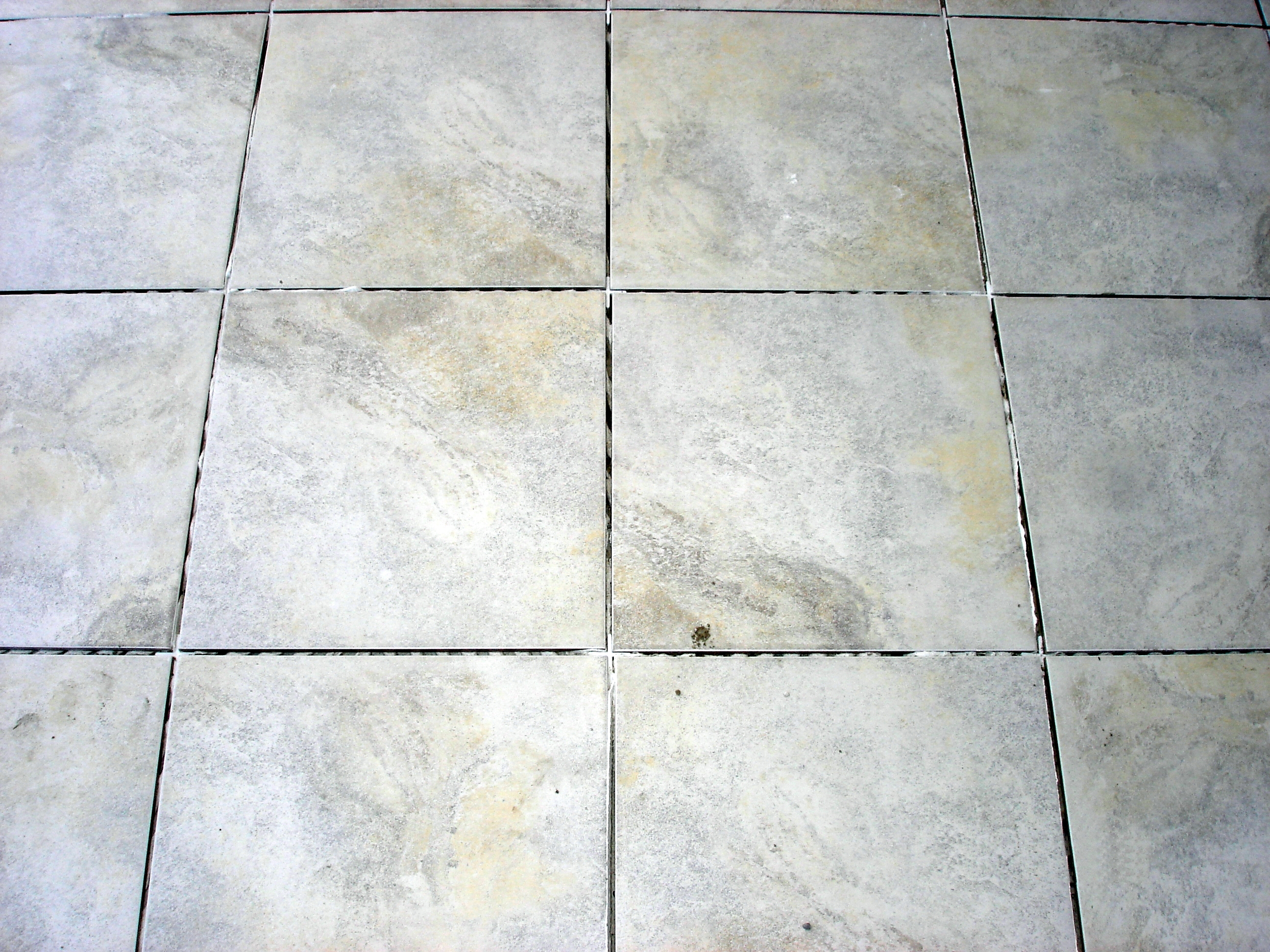 πλακάκια